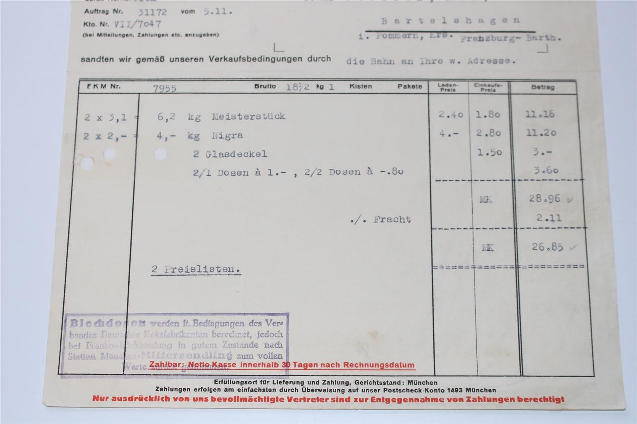 Fuß einer Feurich-Keks-Rechnung mit Mehrwegstempel